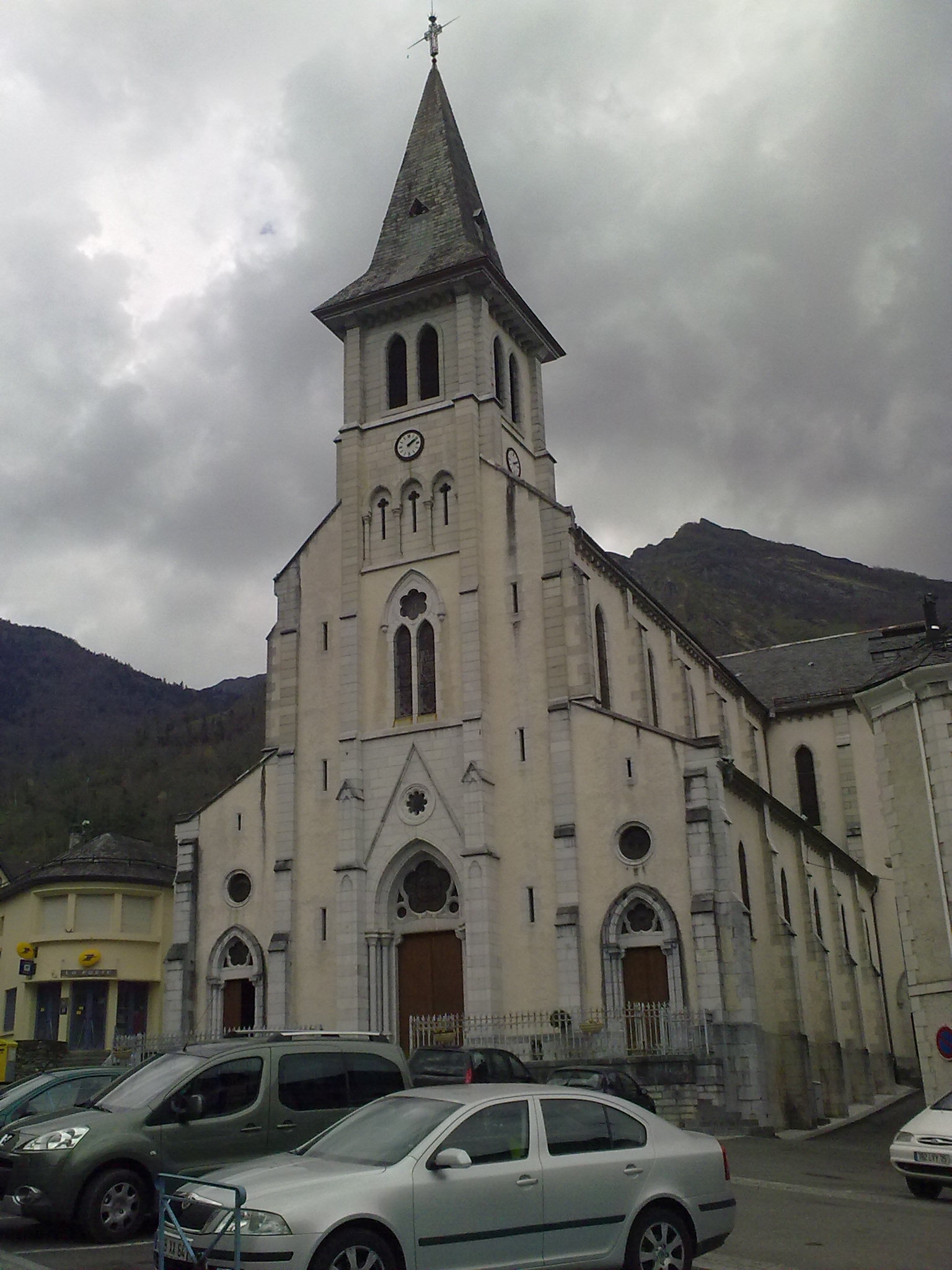 Laruns